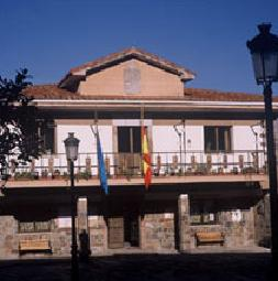 Ayuntamiento del concejo de Illas, Asturias.